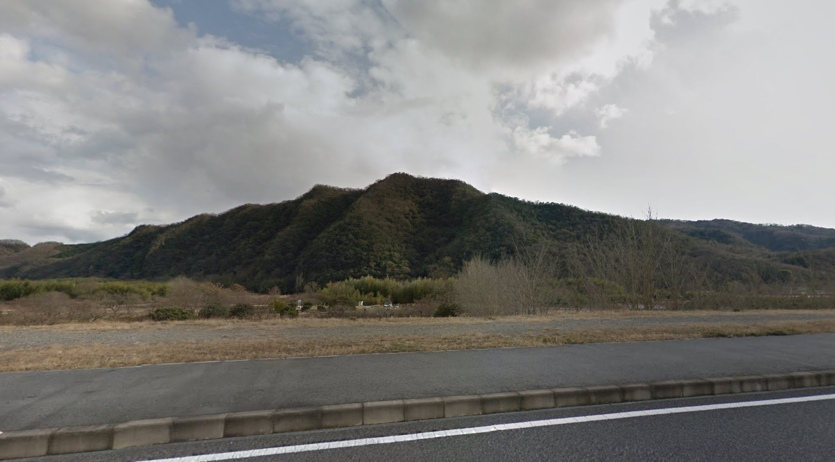 穝所元常の居城があった山。